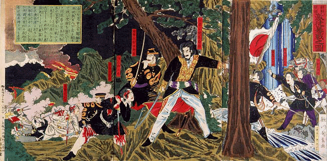 壬午軍乱（1882年） 「朝鮮変報 激徒暴戦之図」